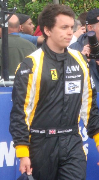 Jonny Cocker 2012 Le Mans